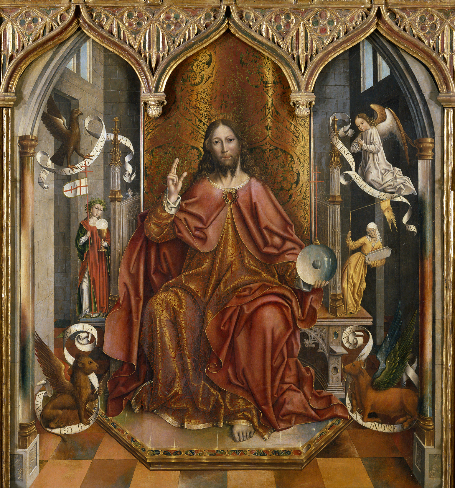 La obra representa a Jesucristo sentado en un trono y mirando y bendiciendo al espectador.